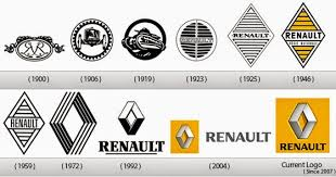 logos de renault